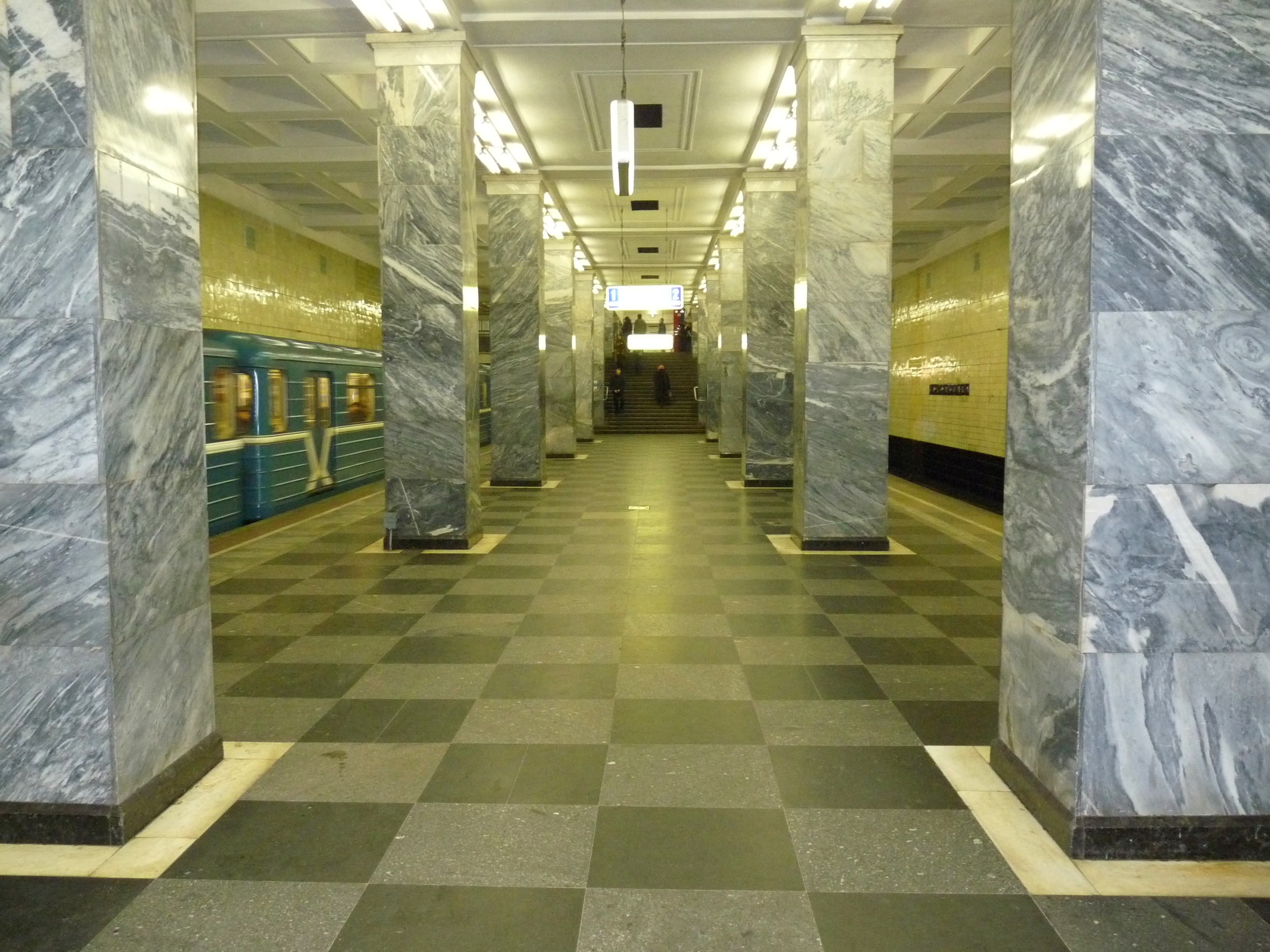 Sokolniki metro station in Moscow, Russia